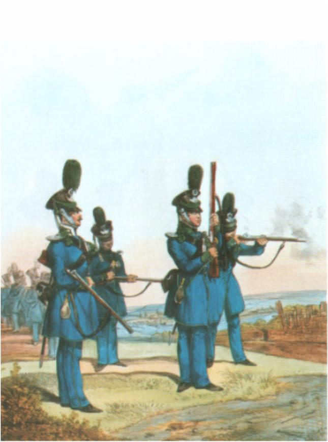 Royal Bavarian Militia (Würzburg-Battalion)